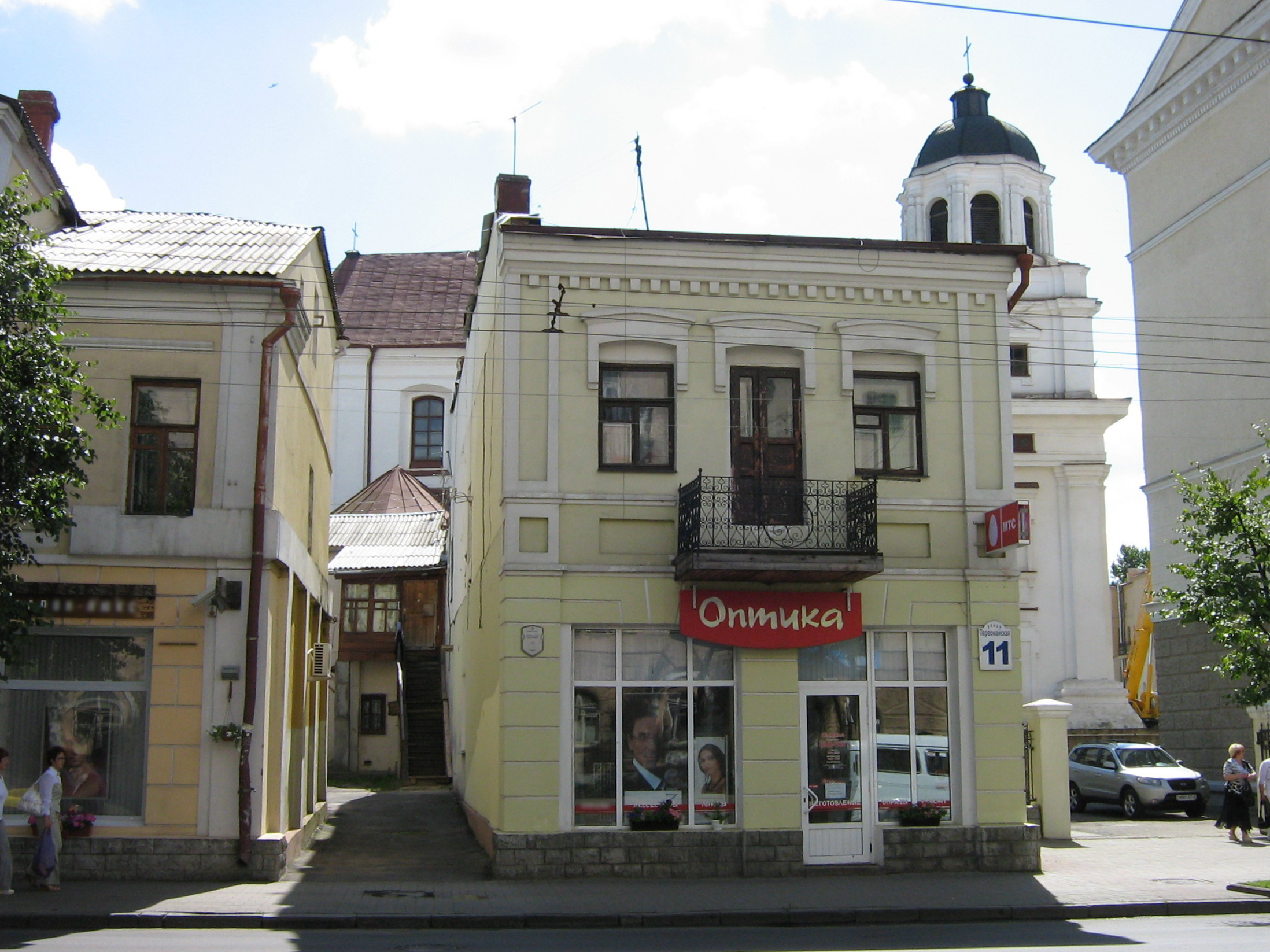 Могилев. Ул. Первомайская.